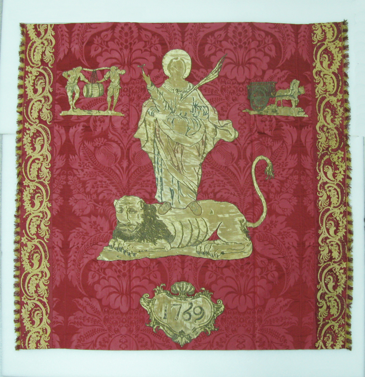 Bandera gremial dels Bastaixos de Ribera en domàs vermell; brodats incrustats; Santa Tecla dempeus damunt un lleó, uns bastaixos, un carro i cavall i la data. 1769. Col·lecció del Museu d'Història de Barcelona.